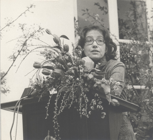 Foto van mijn moeder Dr. G.M. de Meyer, tijdens haar woordje bij de uitreiking aan haar van de Deventer-stadspenning 'de Gulden Adelaar' stadskantoor te Deventer.